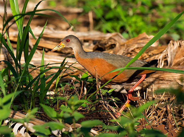 Piraju-SP - Brasil